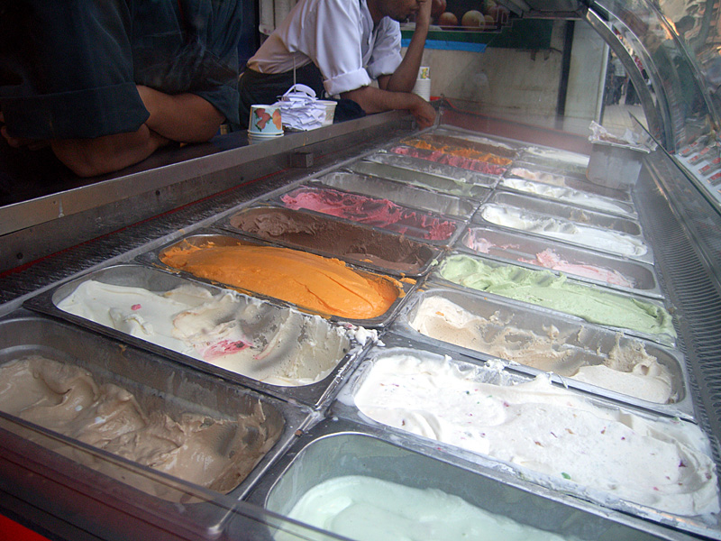 Eisstand in einer Konditorei